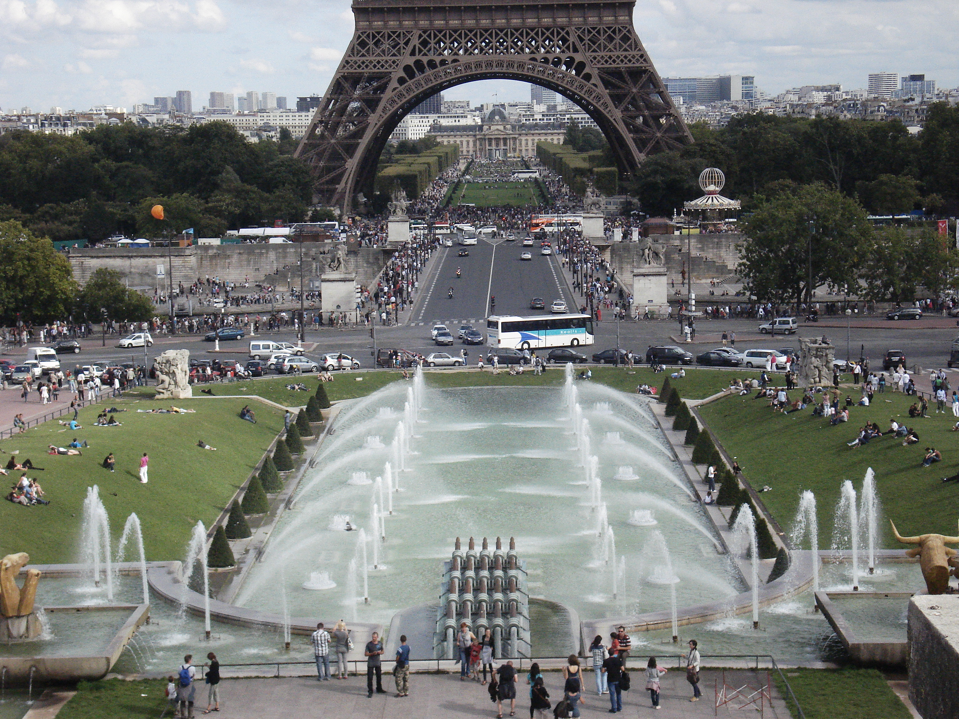 Tour Eiffel (Inscrit) .